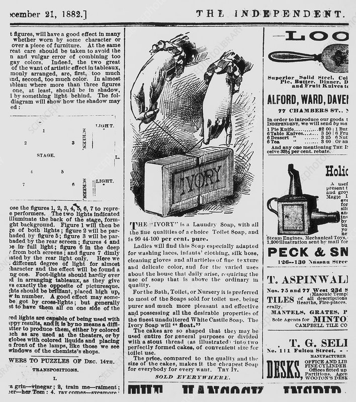 Ivory garbitegiko xaboiaren lehen iragarkia, 1882ko abenduan The Independent egunkarian agertu zena. Lehenengo Ivory xaboi pastela urrian saldu zen.